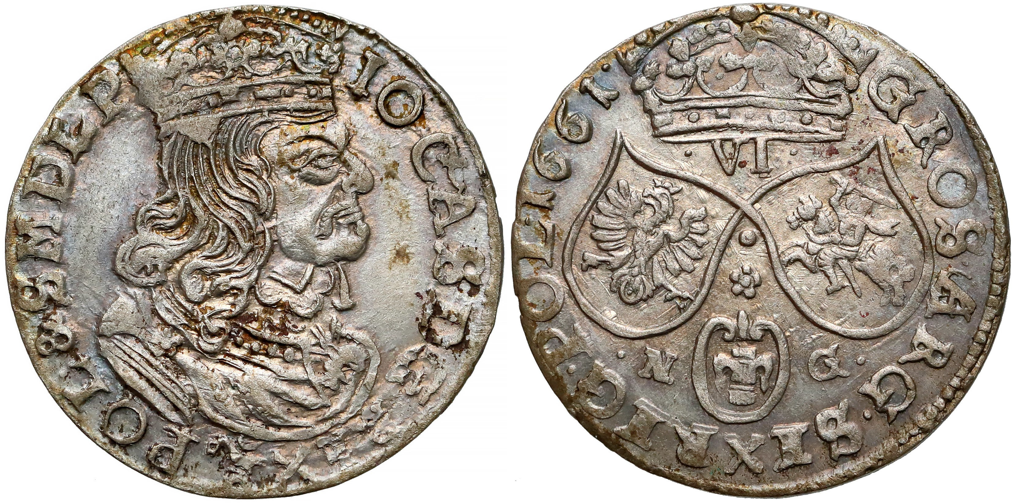 Szóstak 1661 Poznań